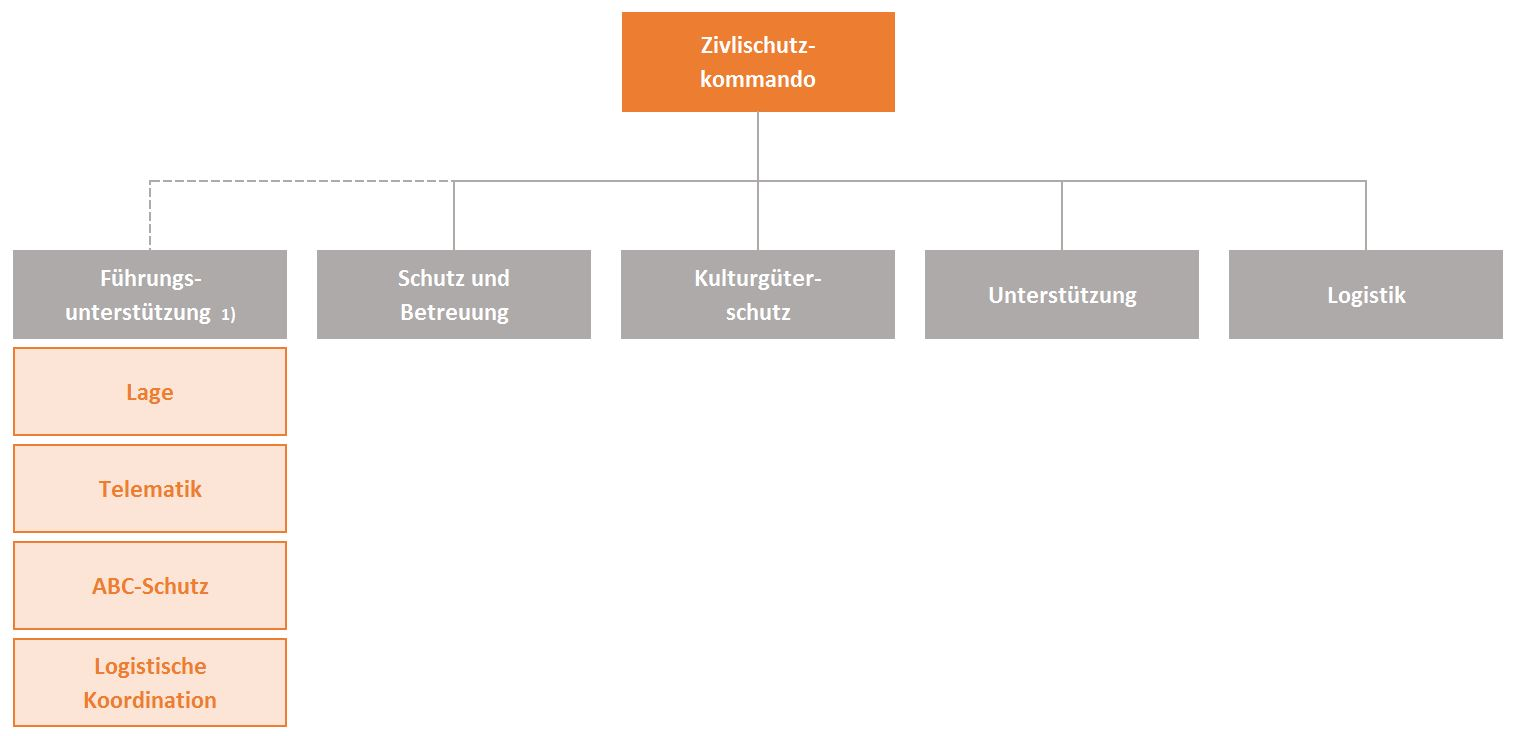 Organisation des ZS gemäss BABS